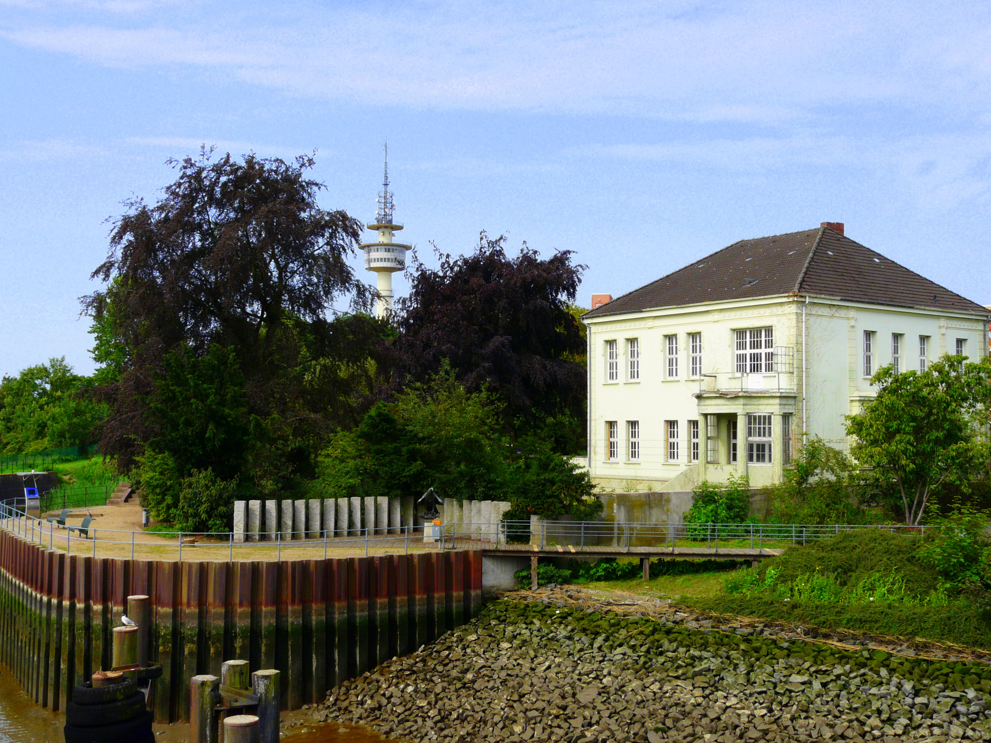 Villa Seebeck in Bremerhaven, Deichstraße 15 / Fischplatz.Das abgebildete Objekt ist ein geschütztes Kulturdenkmal in der Freien Hansestadt Bremen, mit der Nr. 3043 beim Landesamt für Denkmalpflege registriert.